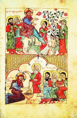 Вход Господень в Иерусалим. Умовение ног. Миниатюры из Евангелия. Мастер Ованнес Хизанеци. 1392 г. Хизан, Васпуракан (Матен. 3717. Л.12)